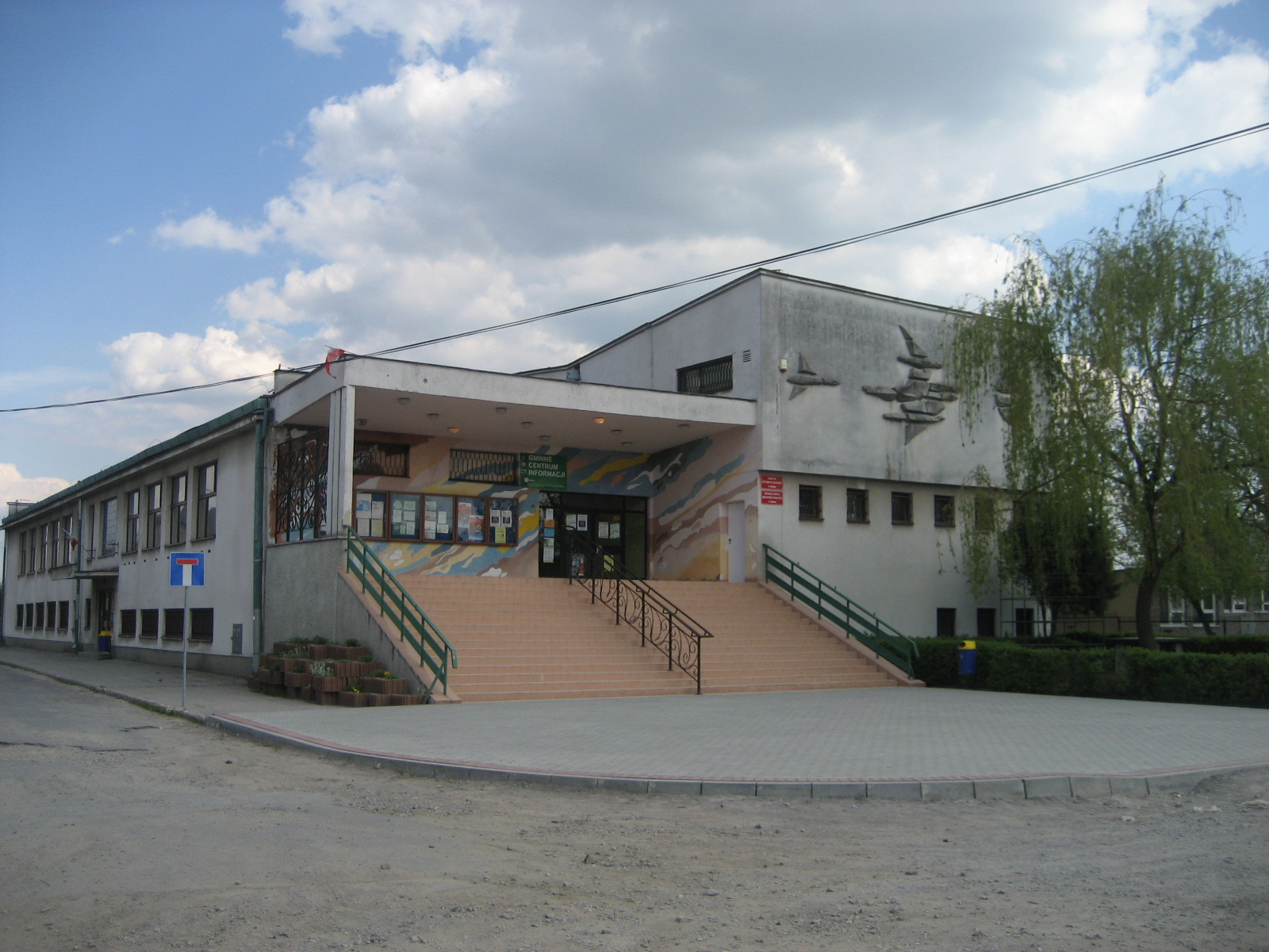 Dom kultury w Żabnie